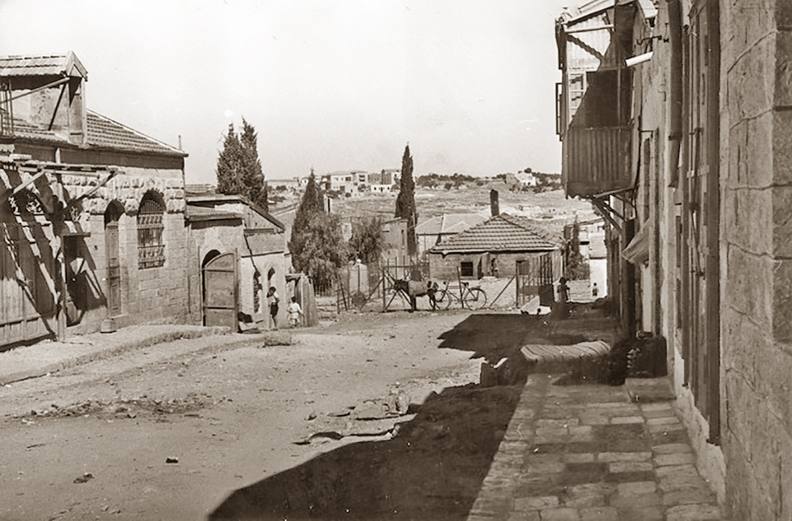 נחלת אחים 1937 - דגני